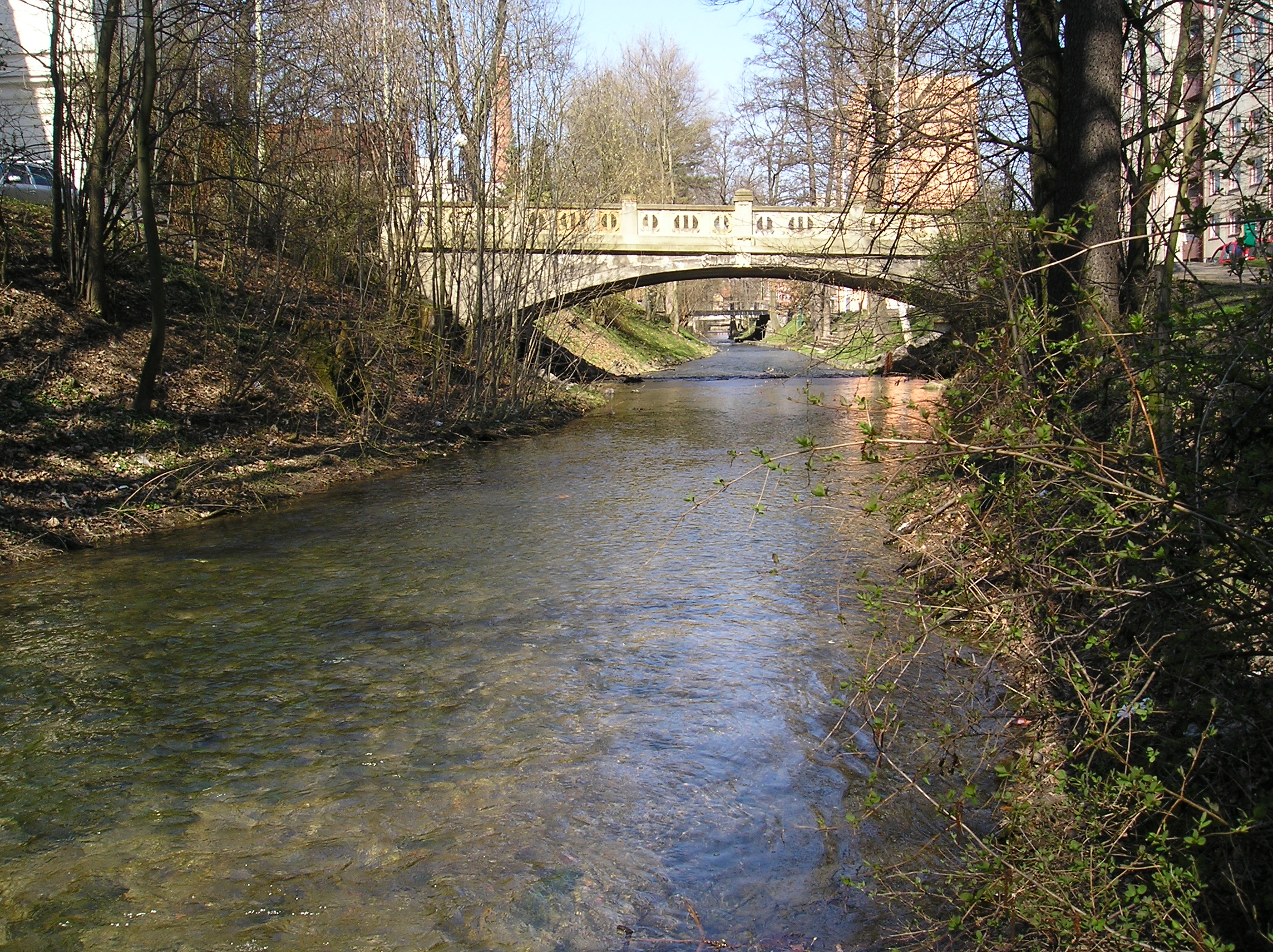 Řeka Loučná protékající Litomyšlí nedaleko Smetanova domu